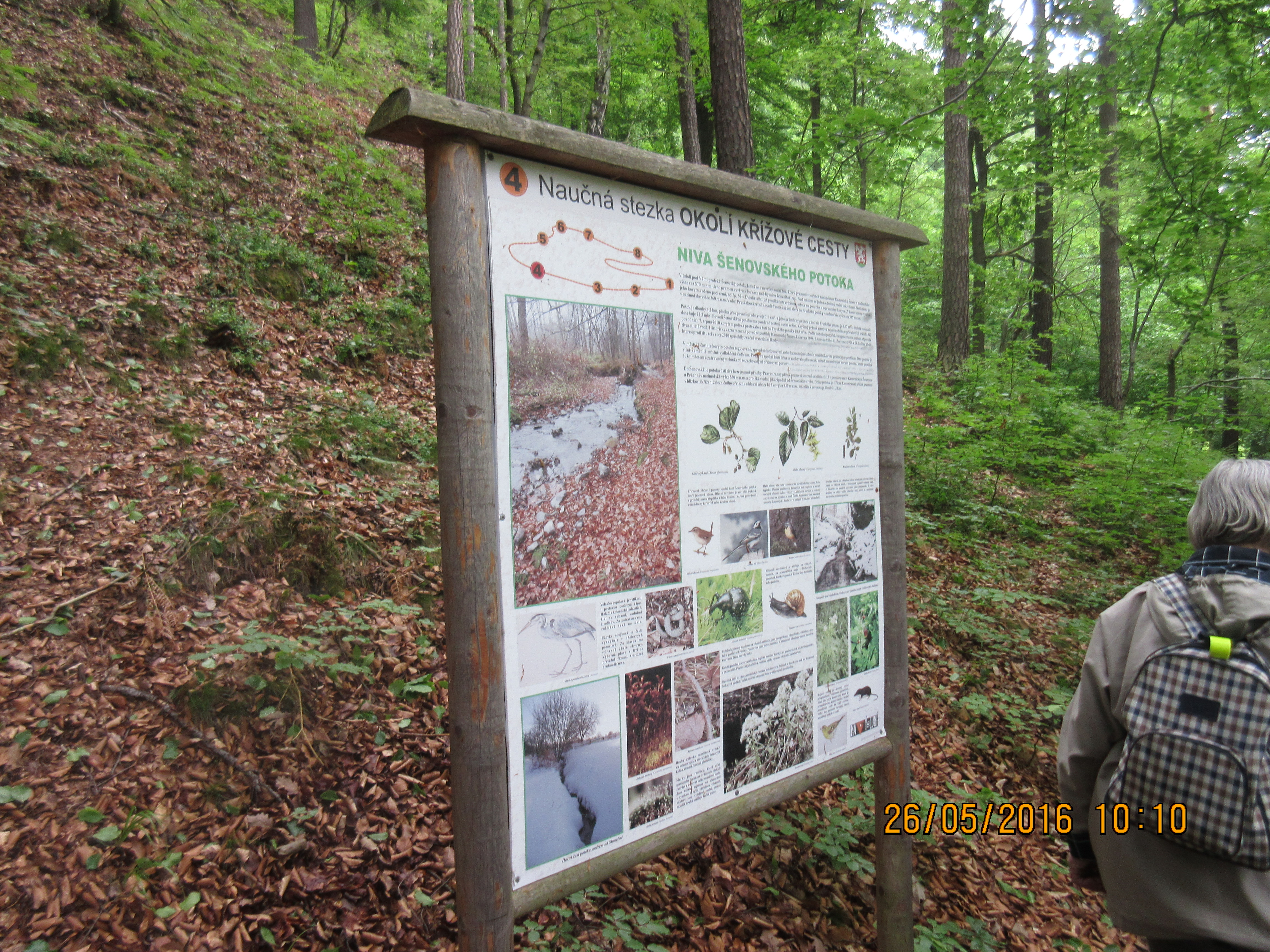 Zastavení na naučné stezce Okolím křížové cesty, severní okraj města Kamenický Šenov